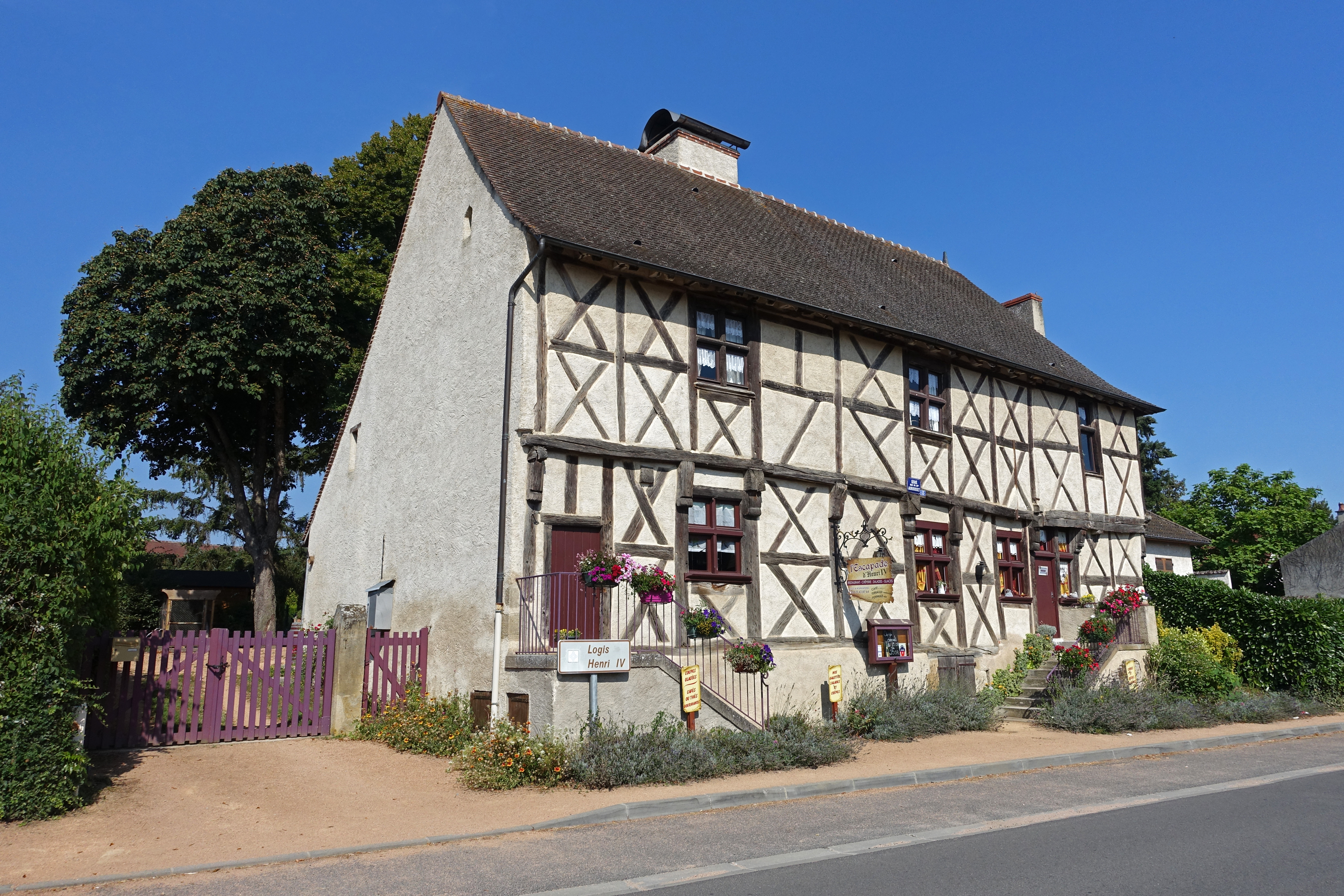 Logis d'Henri IV à Neuilly-le-Réal, Allier